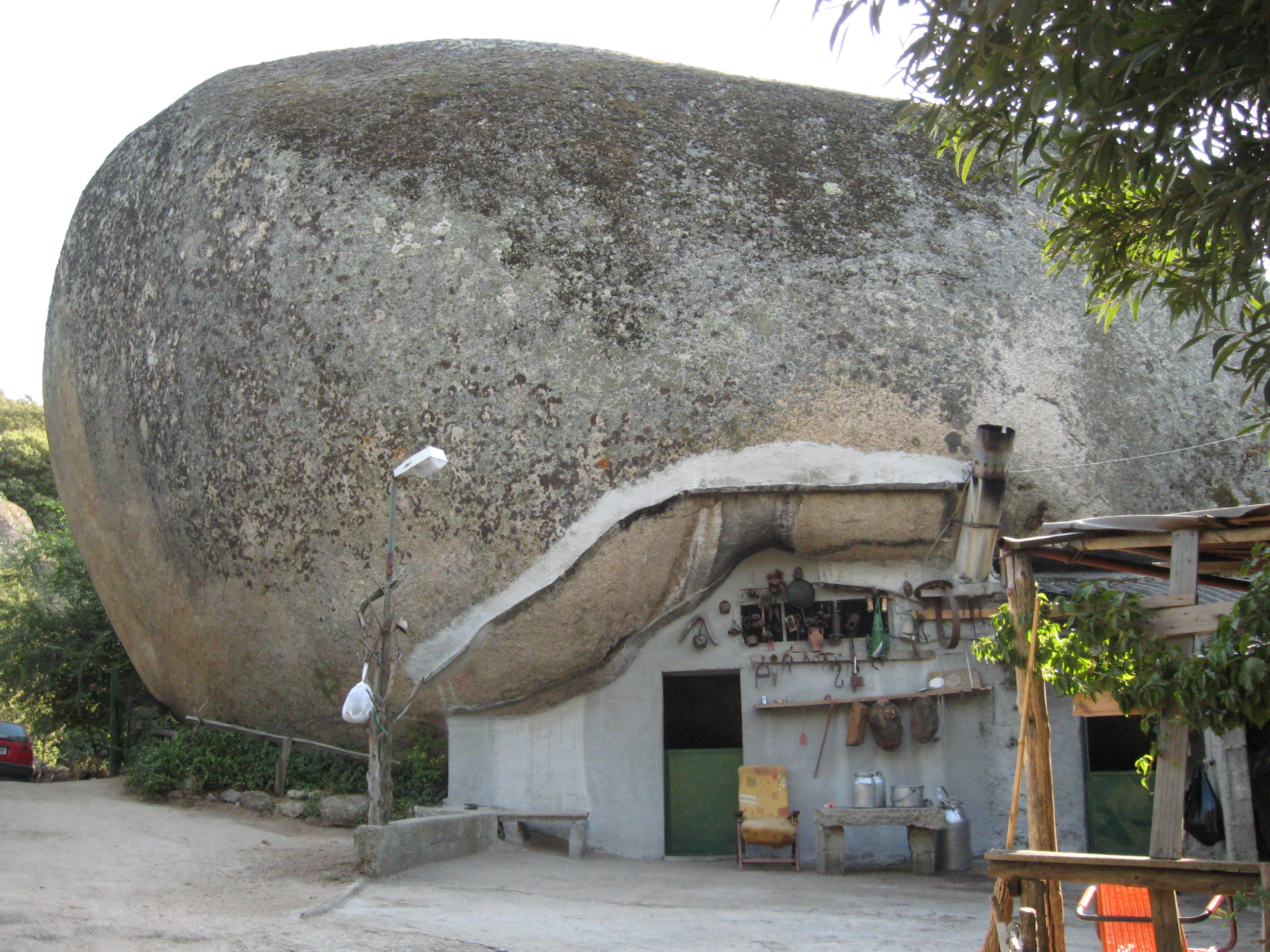 Sardegna - Casa nella roccia - Monte Ortobene. L'ovile nella roccia detto "sa conca" (o "il fungo"), verso il parco di Sedda Ortai, Italia